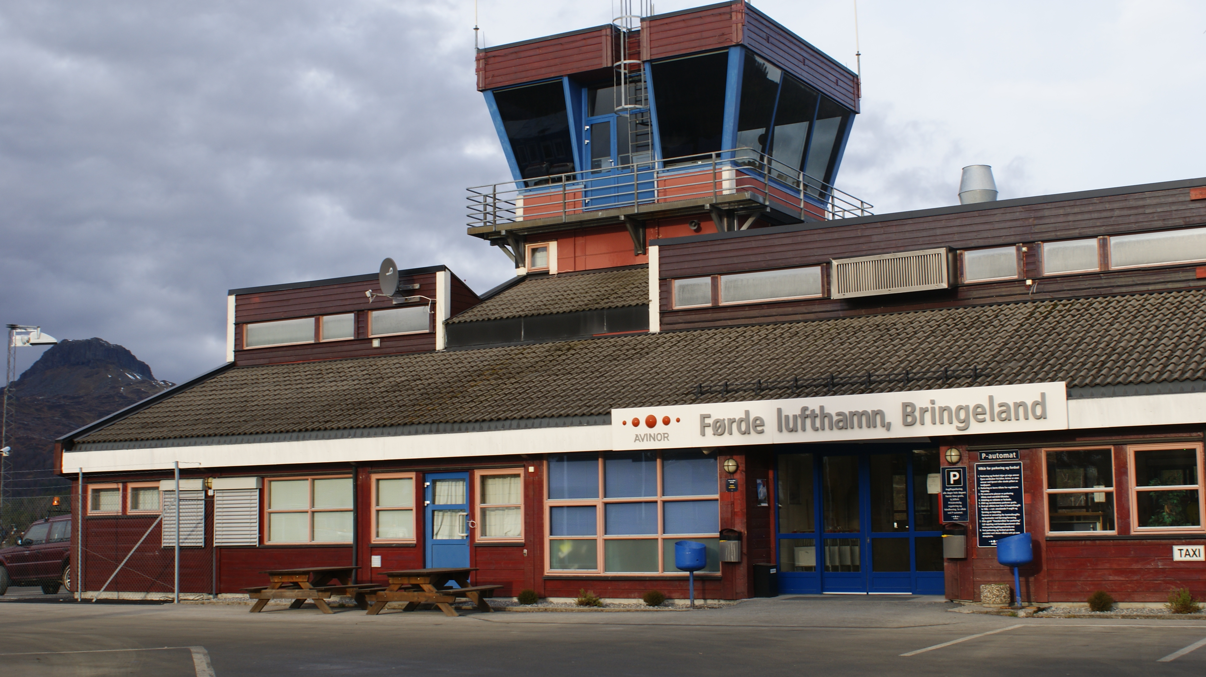 Førde Airport, Sogn og Fjordane, Norway.